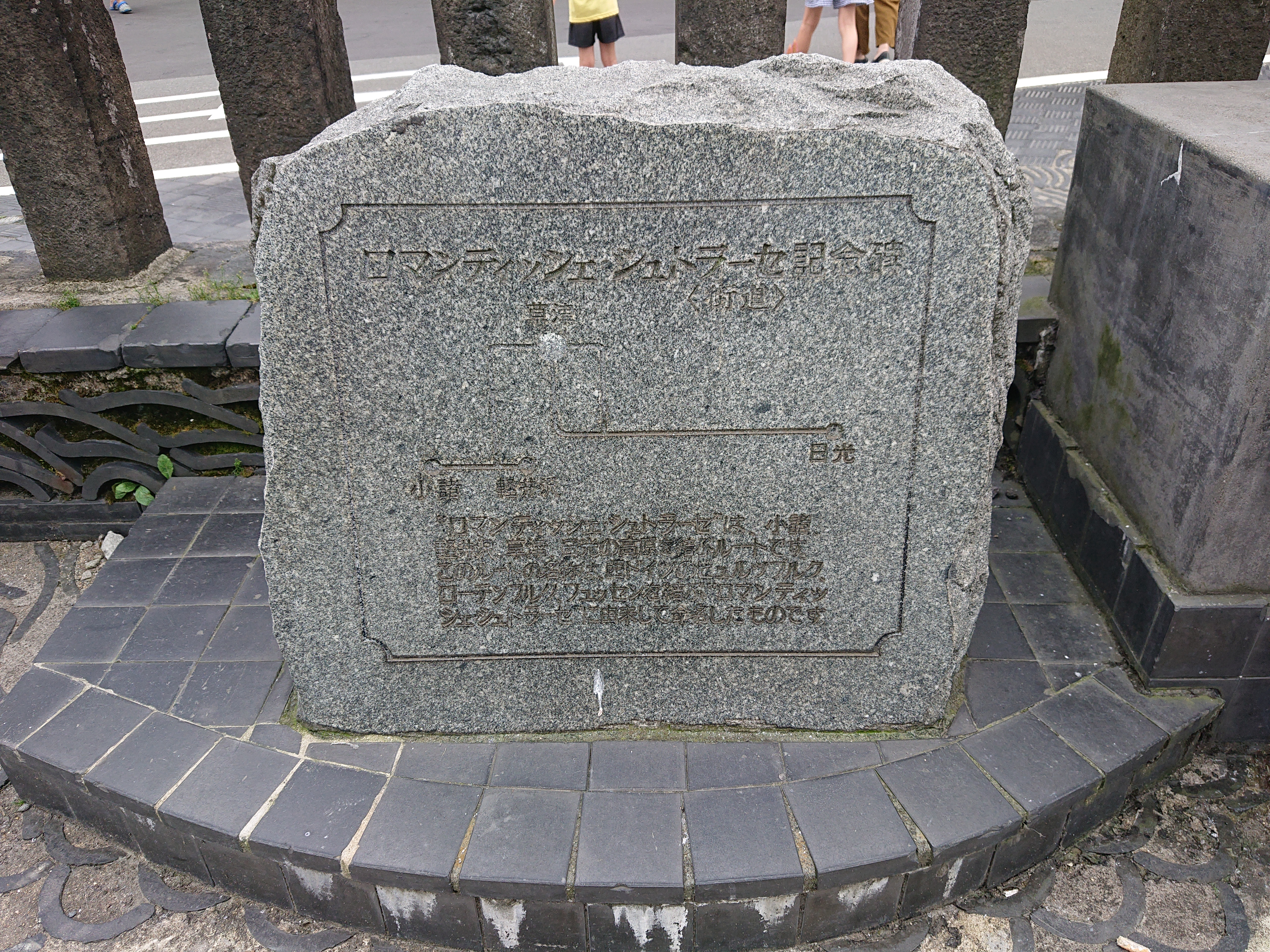 草津温泉にある制定記念の碑